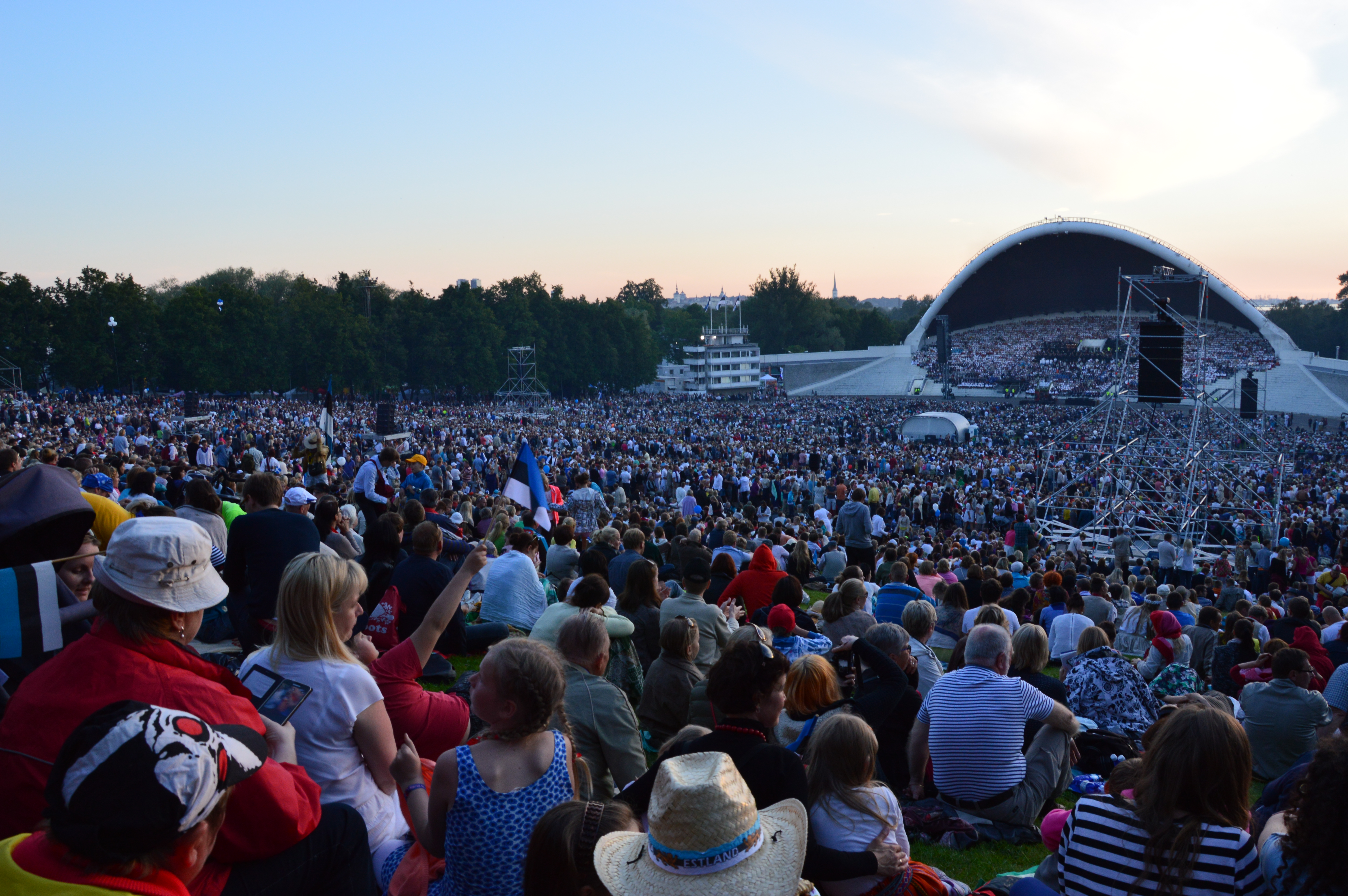 XXVI üldlaulupidu